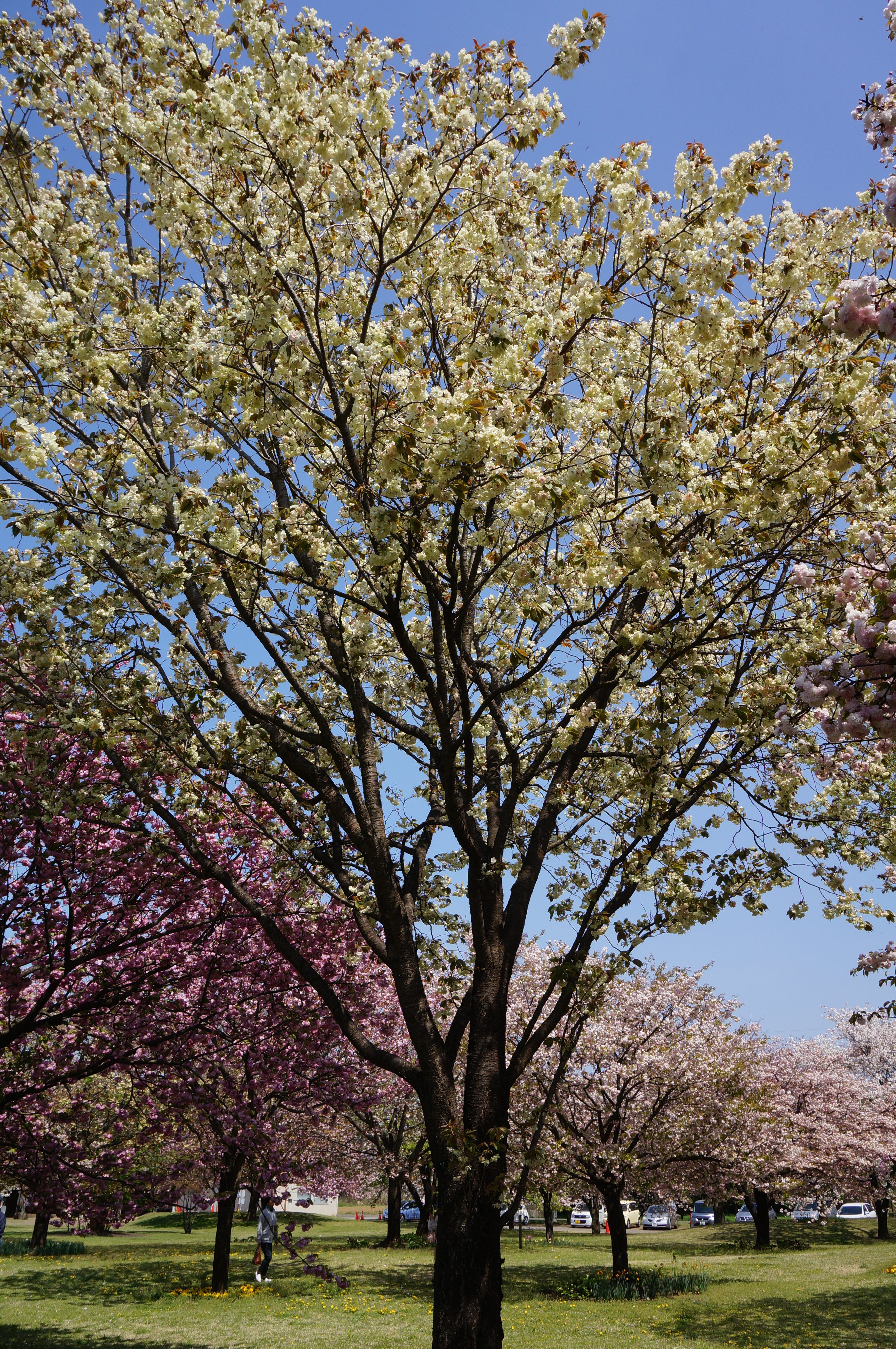 日本花の会結城農場さくら見本園にて